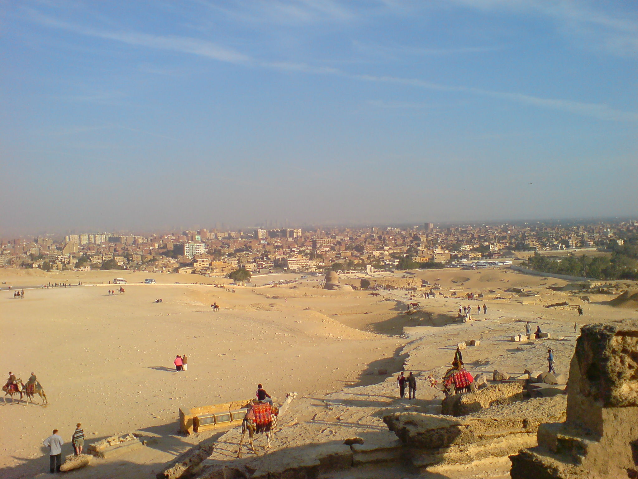 Caire. 20millions d'hommes...... , Noel 2008